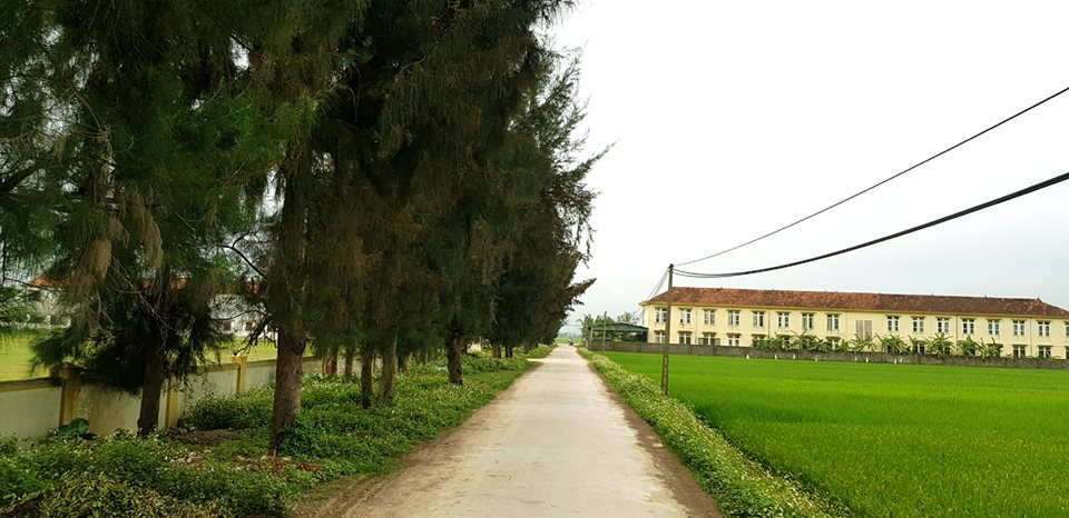 quỳnh đôi